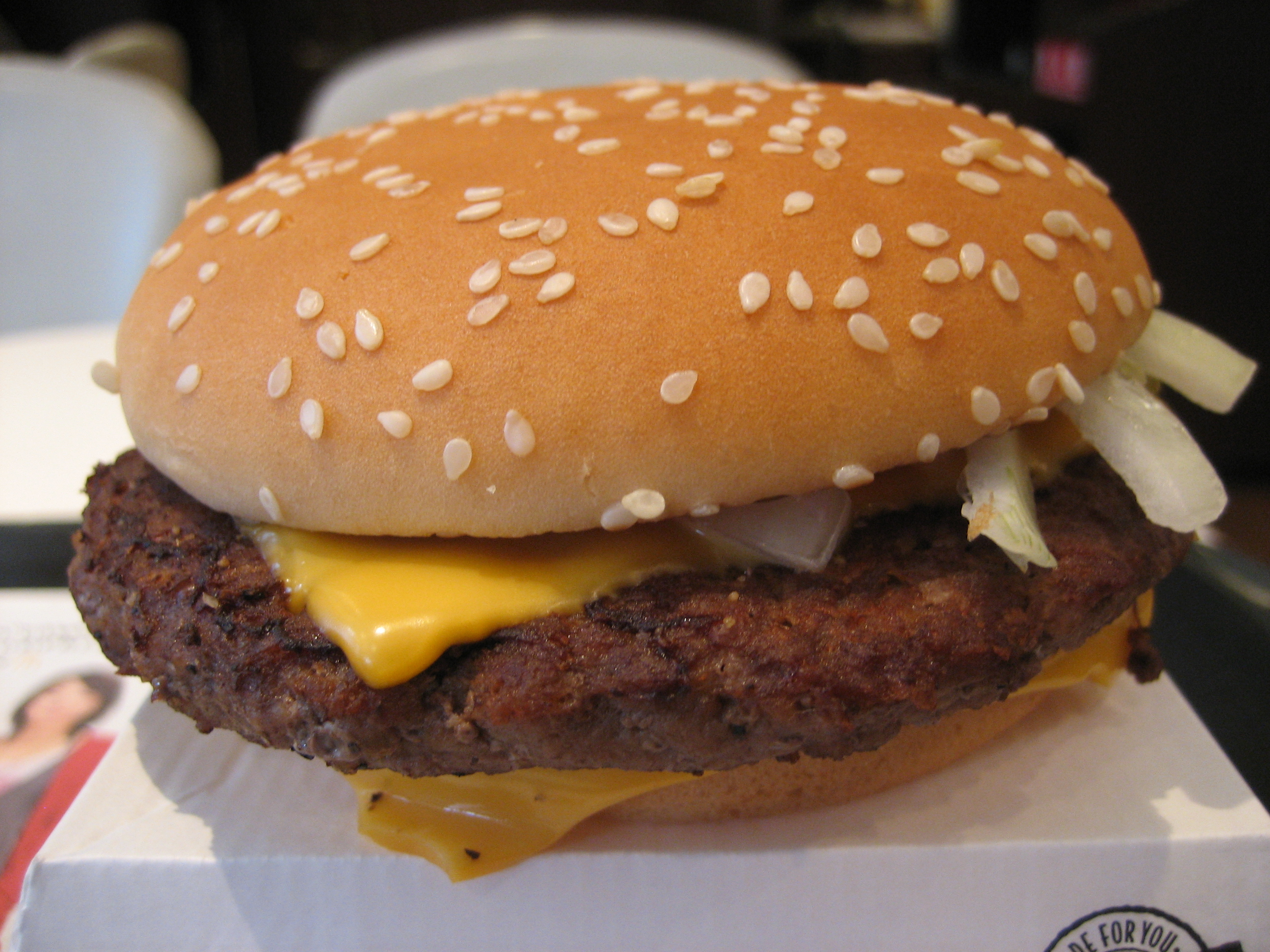 日本マクドナルドが販売しているクォーター・パウンダー。